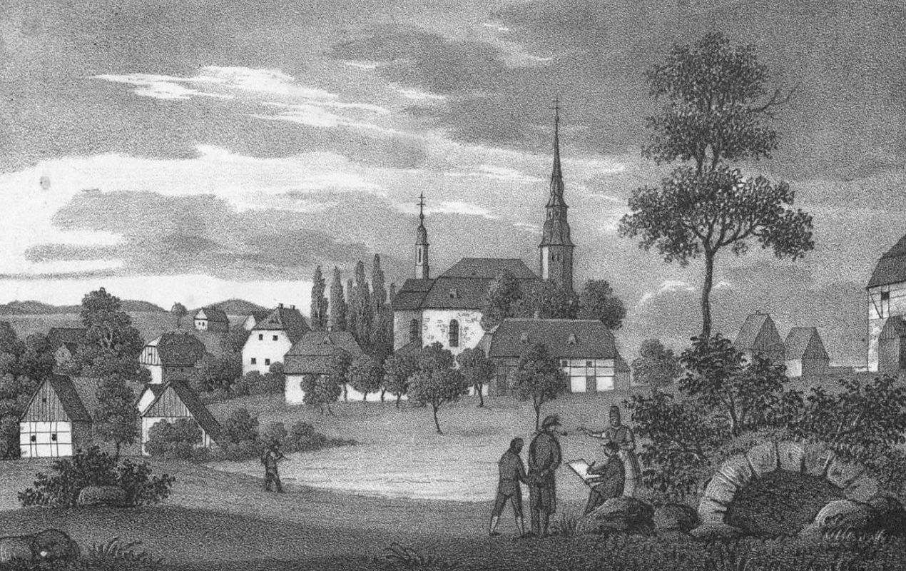 Działoszyn ok. 1840